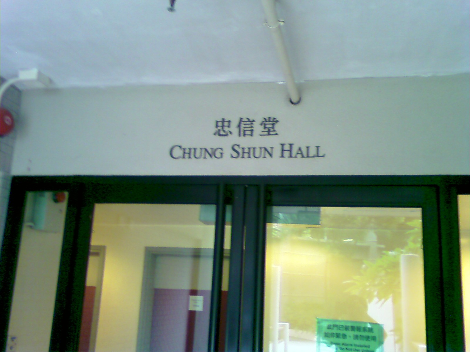 Chung Shun Hall 2